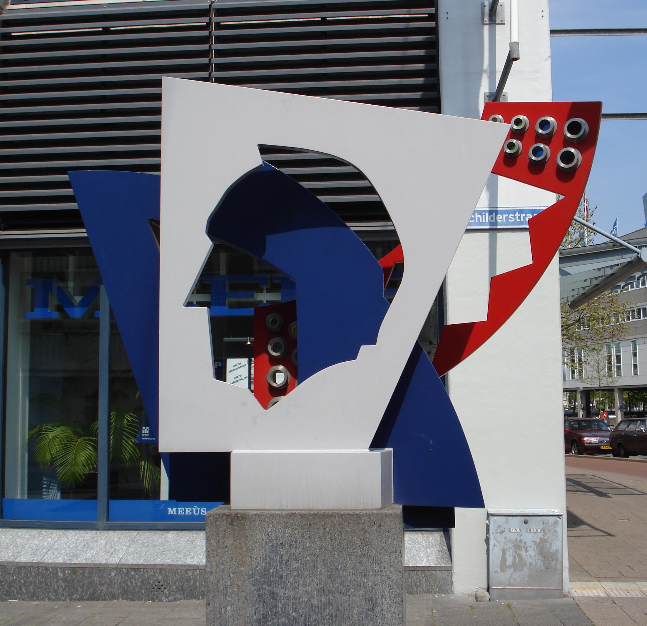 Rotterdam, Schilderstraat. Kunstwerk. Monument Valkhoff "Langs de Maas" van Cor Kraat. Rotterdam/The Netherlands